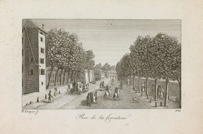 Pierre Escuyer (1749-1834), Rue de la Corraterie, 1823, 10,4 x 18.4 cm (au trait carré), 15,7 x 23,6 cm (à la cuvette), eau-forte, 20,7 x 28 cm (à la feuille), Atlas pittoresque de Genève, ou collection des vues les plus intéressantes de cette ville, Genève, 1822, VG. À gauche, l'ancienne Tour Thélusson, détruite en 1903.